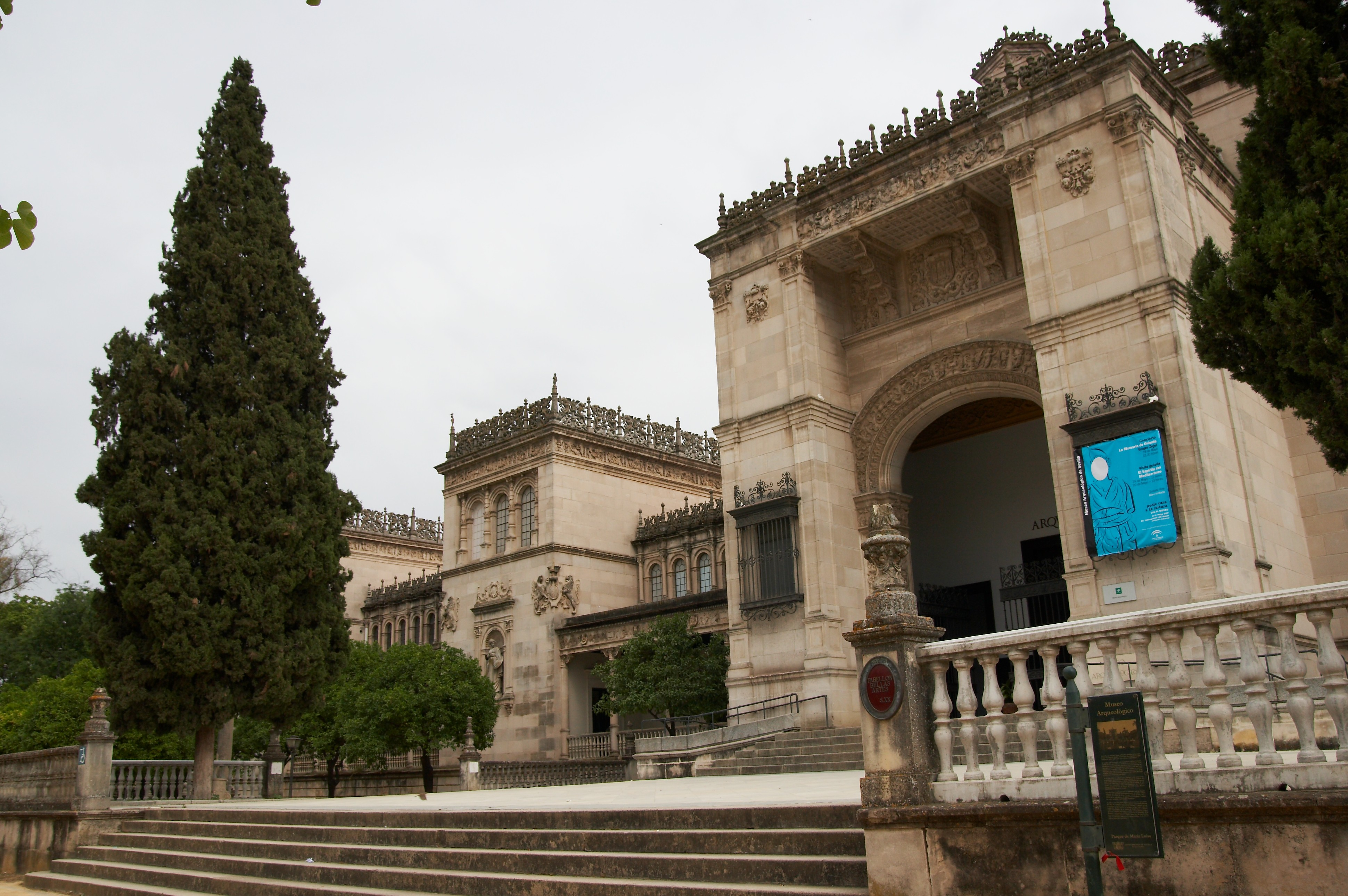 Museo Arqueológico de Sevilla, Sevilla, España.